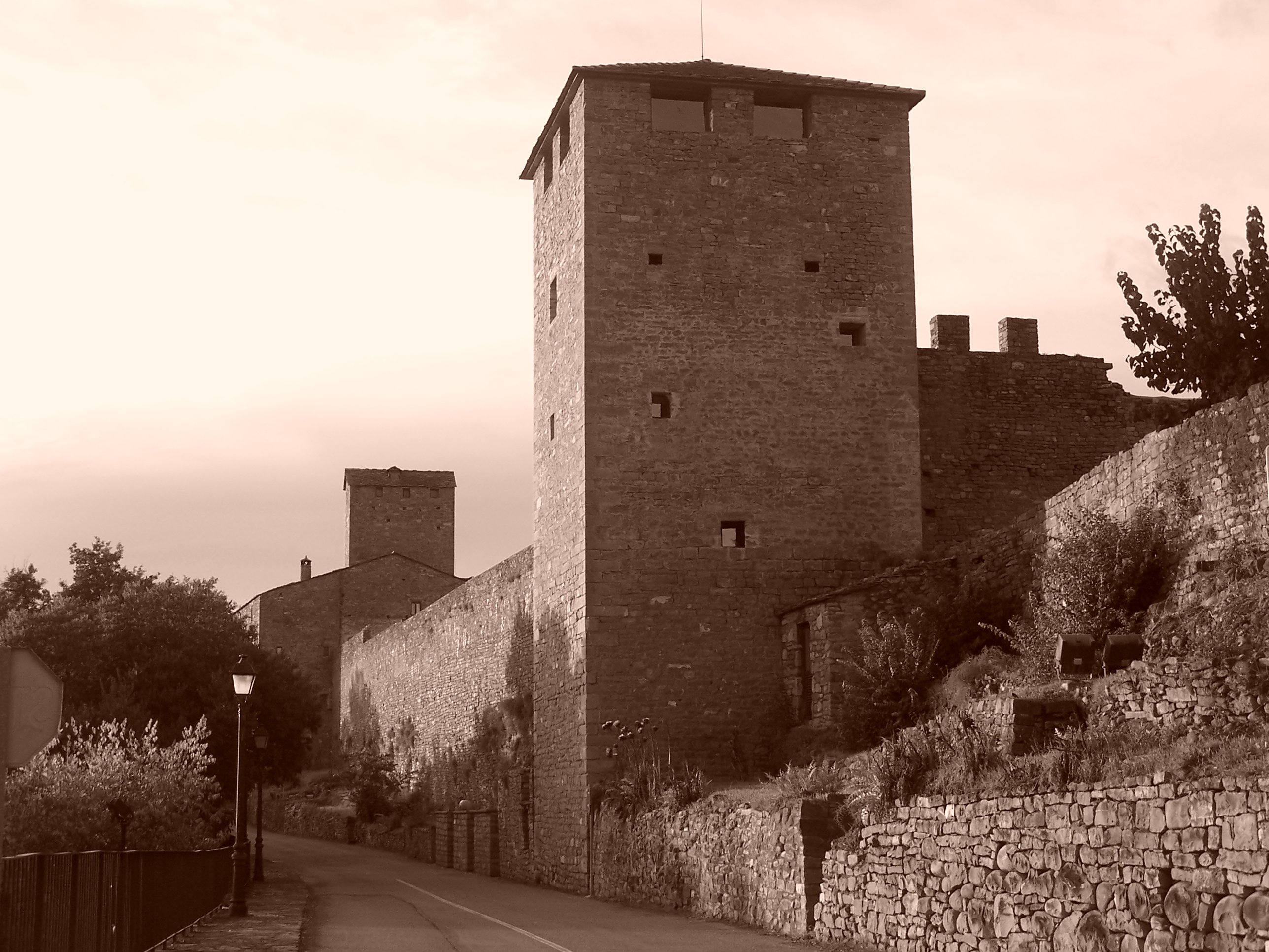 Muralla exterior del castillo de Ainsa